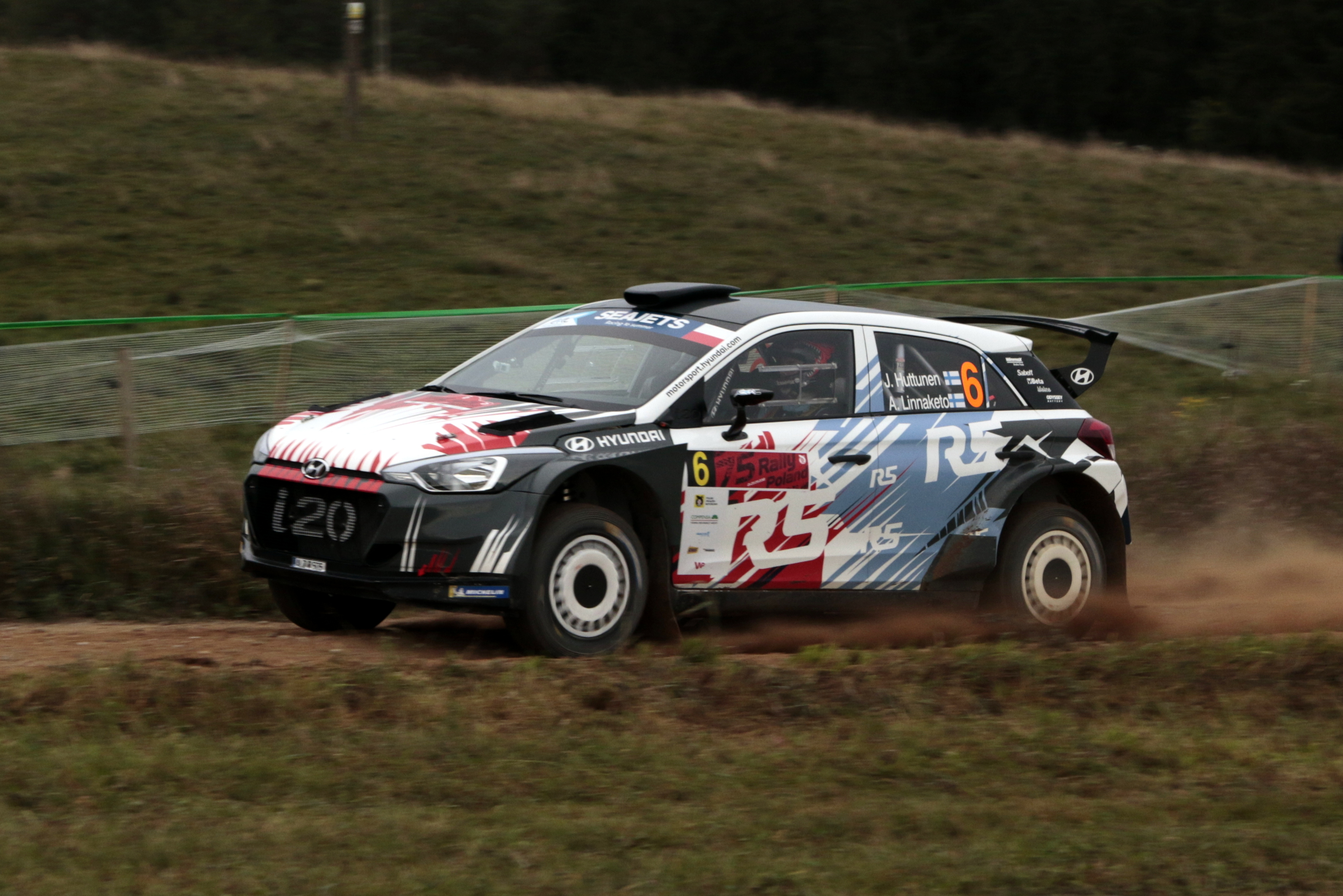 Rajd Polski - 2018 Jari Huttunen